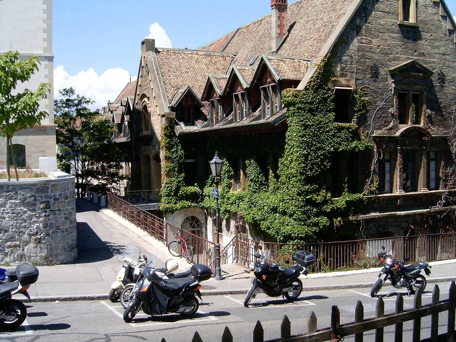 Collège Calvin à Genève. Le bâtiment visible tout à gauche est l'ancienne prison de Saint-Antoine. À droite un bâtiment du collège Calvin, construit en 1888 (partie proche de la route), en 1560 (partie éloignée). Entre les deux bâtiments : le passage Mathurin-Cordier.